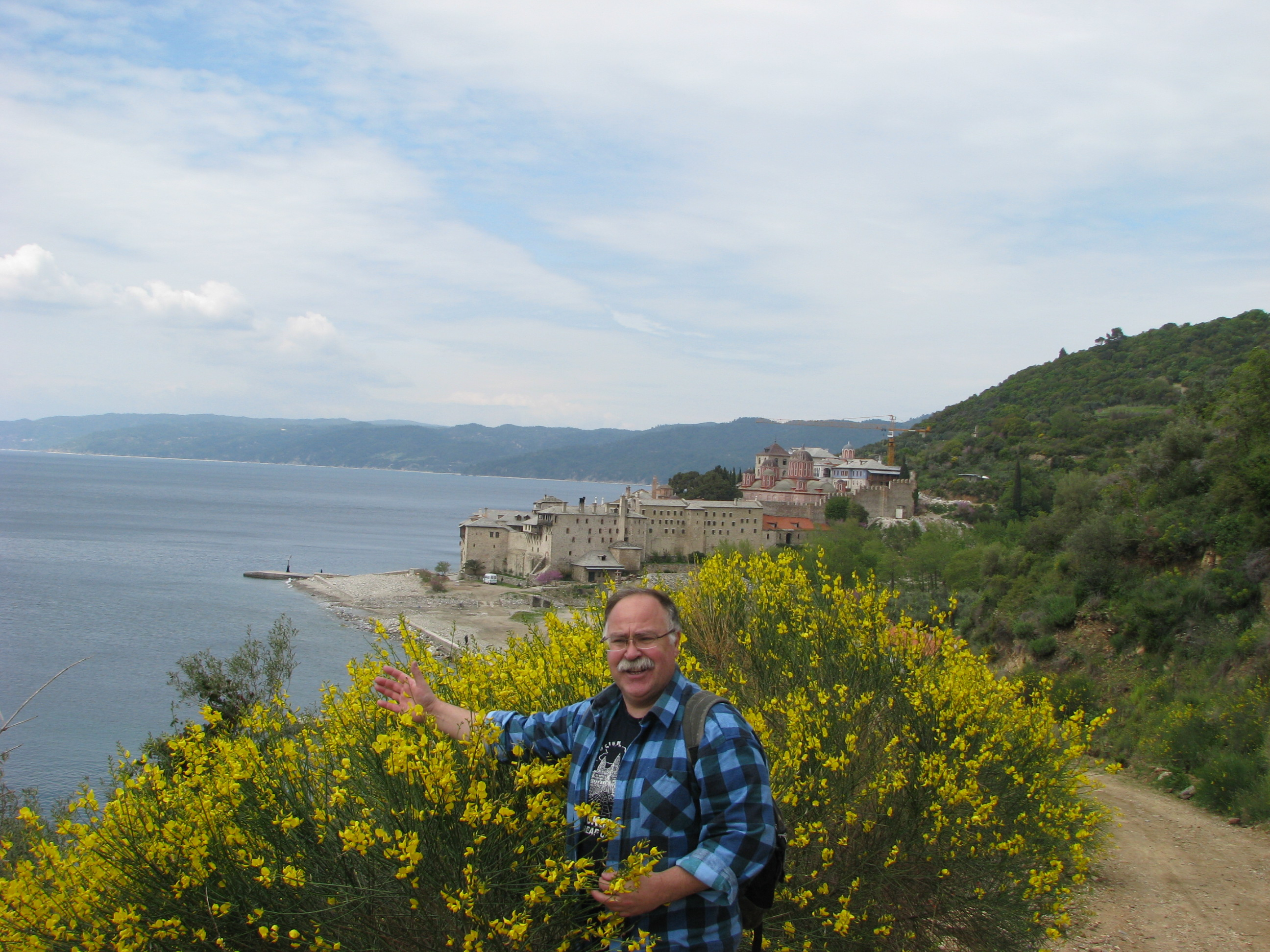 Из Света гора (Атон)